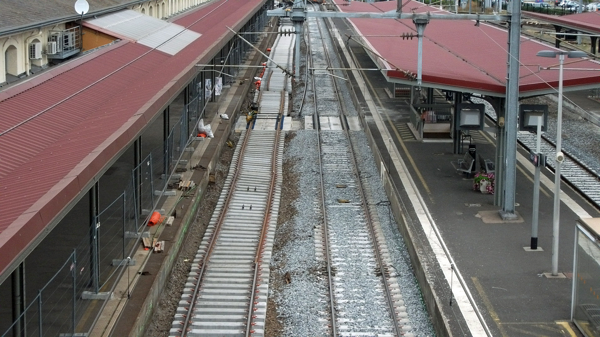 Gare de Vichy pendant les travaux de renouvellement de la voie et du ballast : traitement de la voie B terminé, voie A en cours. On remarque ici la création d'une section sur dalle au droit de l'accès principal à la voie A et au-dessus du passage souterrain. Vue vers le nord en direction de Saint-Germain-des-Fossés, Paris et Lyon.